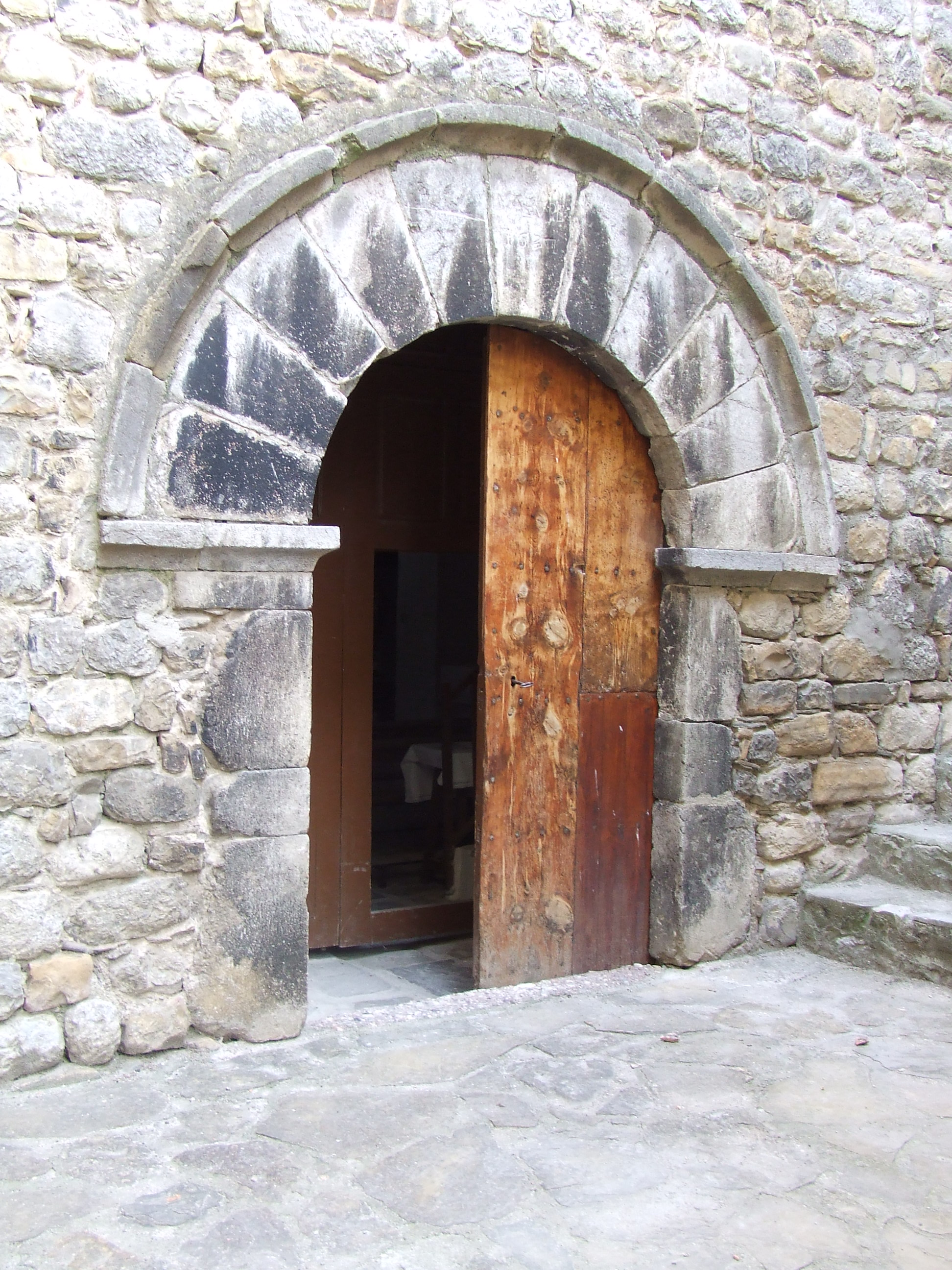 Portalada gòtica de Sant Martí de Canals (Claverol, Conca de Dalt, Pallars Jussà)